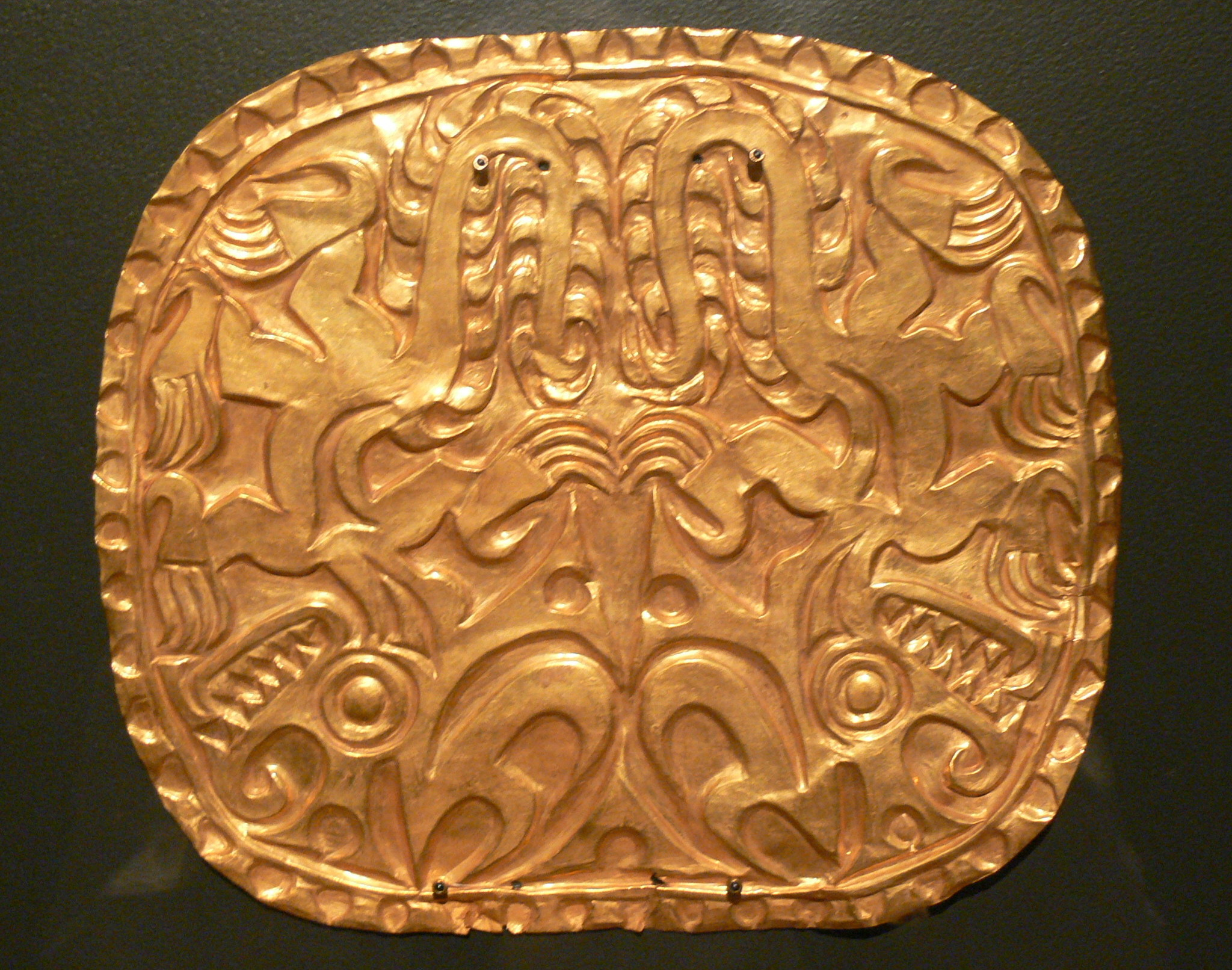 Tulsa, Oklahoma. Gilcrease Museum: Indian golden plaque (500-1000 CE) from Panama